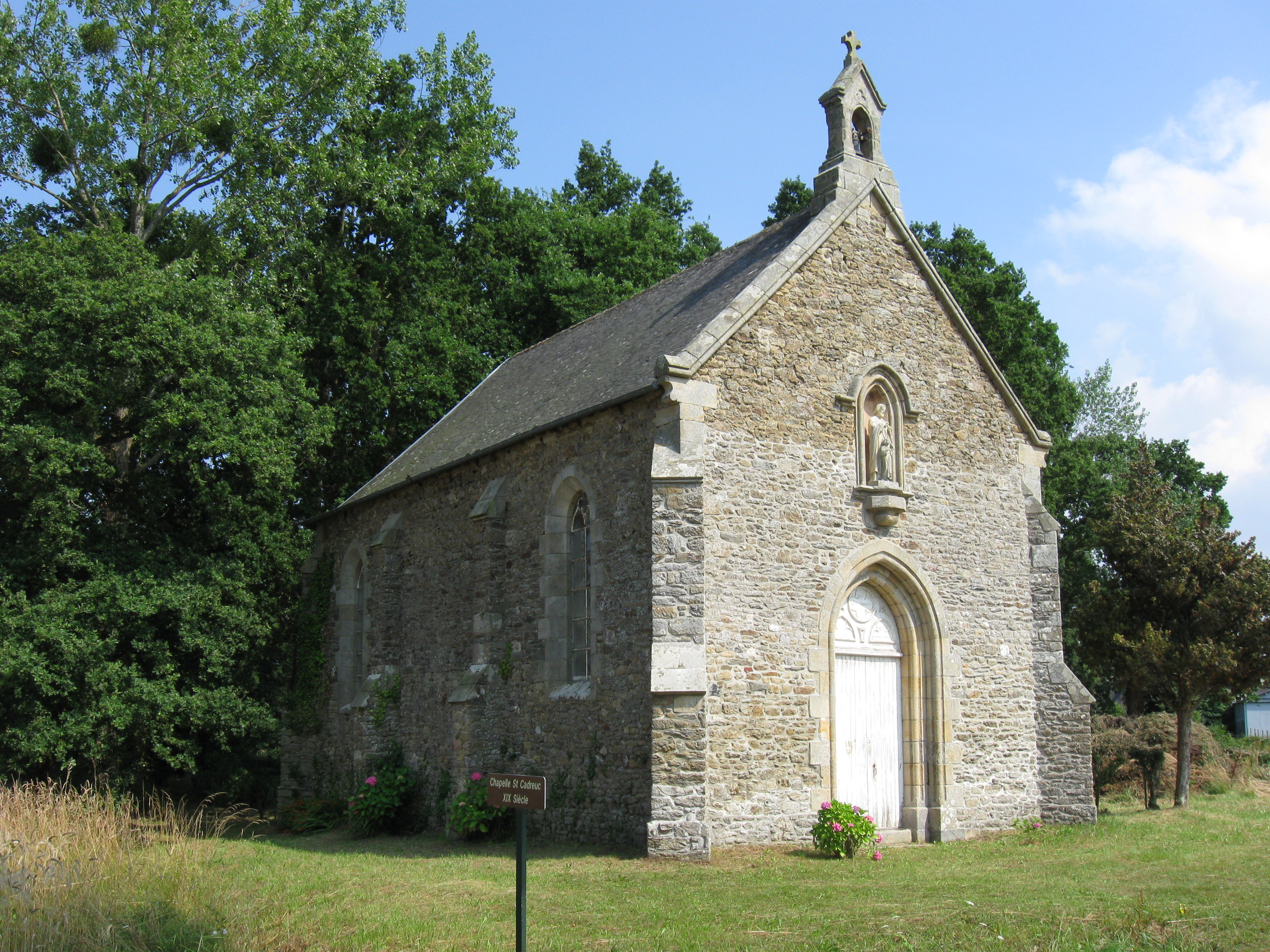 Chapelle Saint-Cadreuc, commune de Ploubalay. (Côtes-d'Armor, région Bretagne).